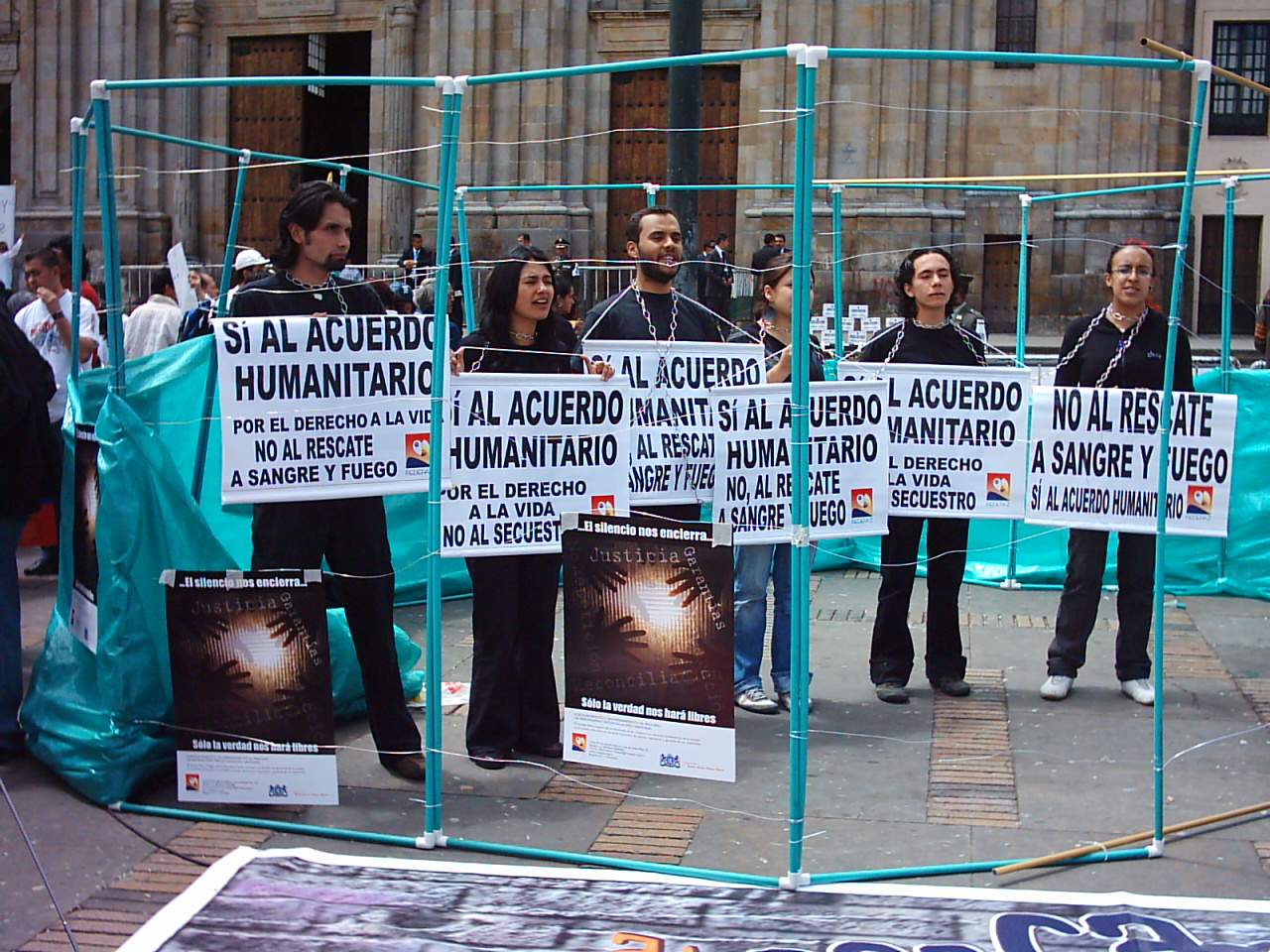 Jornada contra el secuestro en Colombia